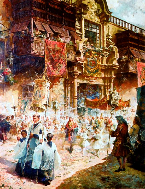 La Procesión del Corpus Christi. Pintura de Teófilo Castillo, pintor peruano.